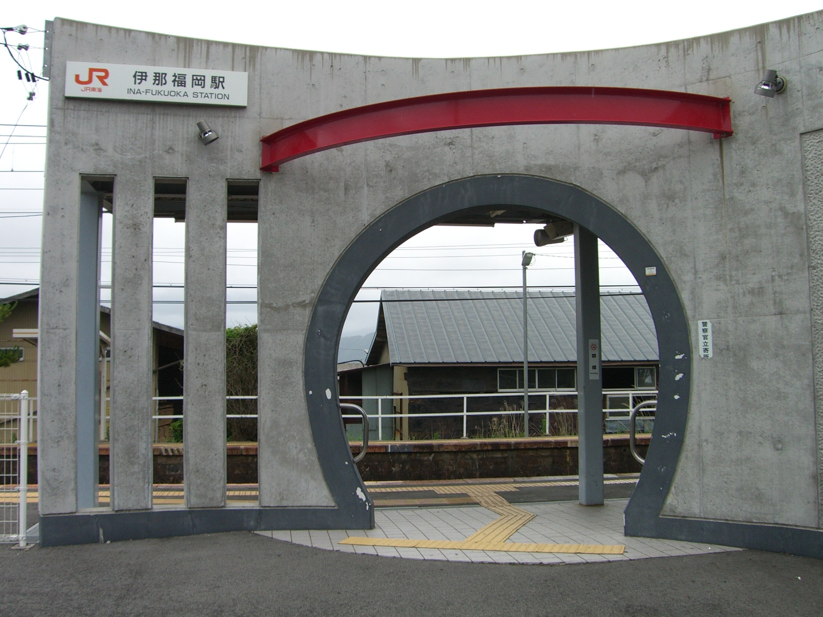 伊那福岡駅